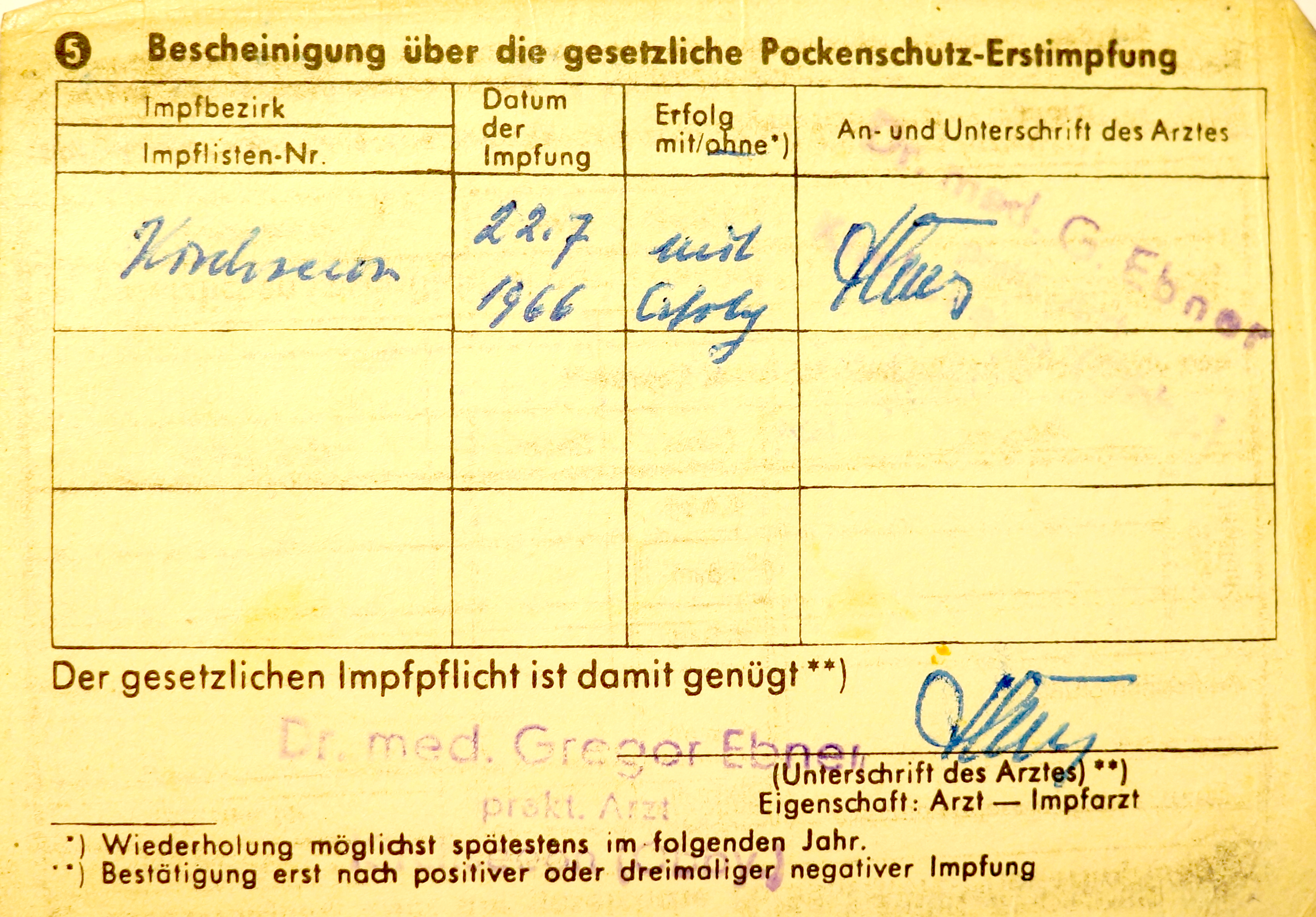 Impfpass mit Stempel "Dr. med. Gregor Ebner" und Unterschrift. Pockenimpfung vom 22.7.1966, Kirchseeon